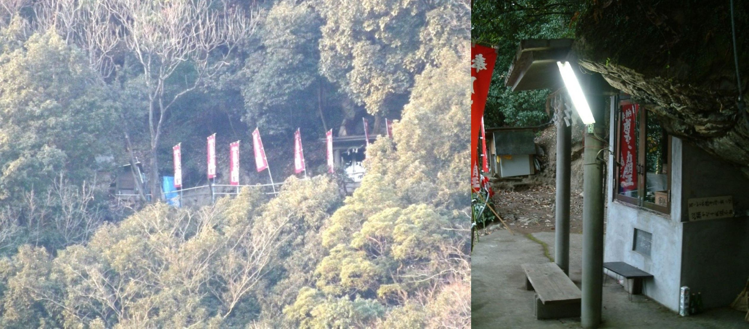 川之江市の成滝不動